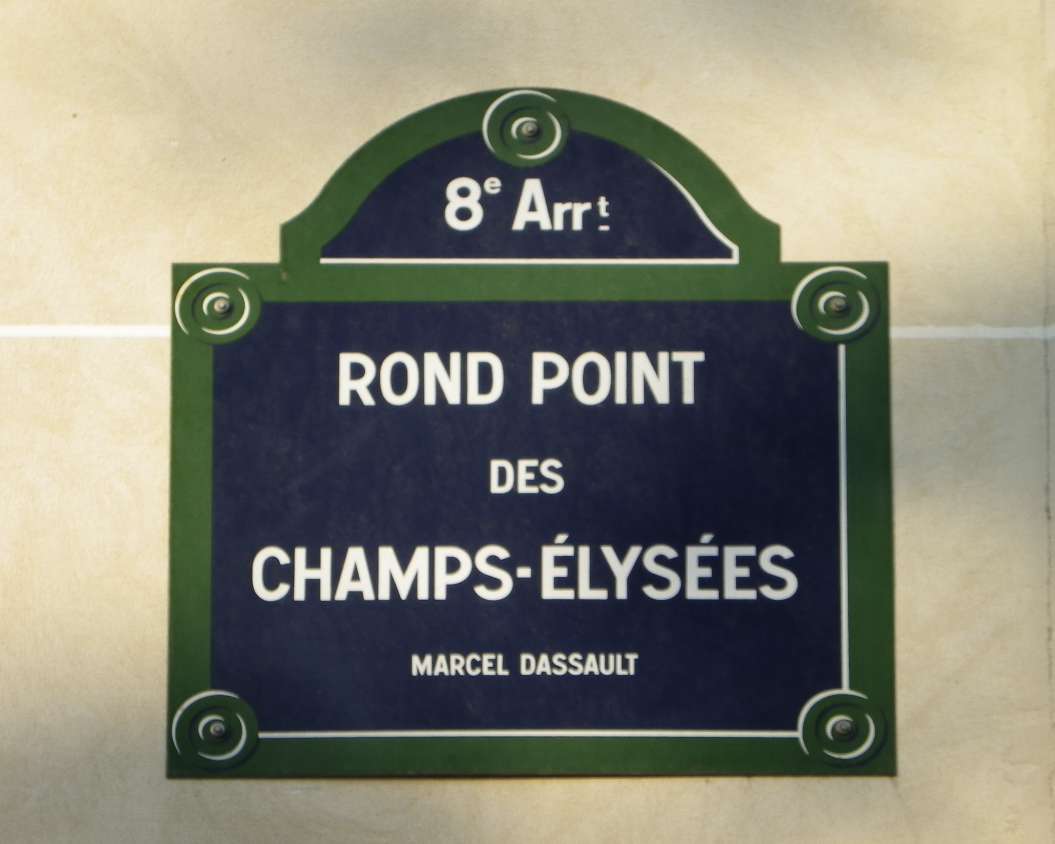 Rond point des Champs-Elysées à Paris